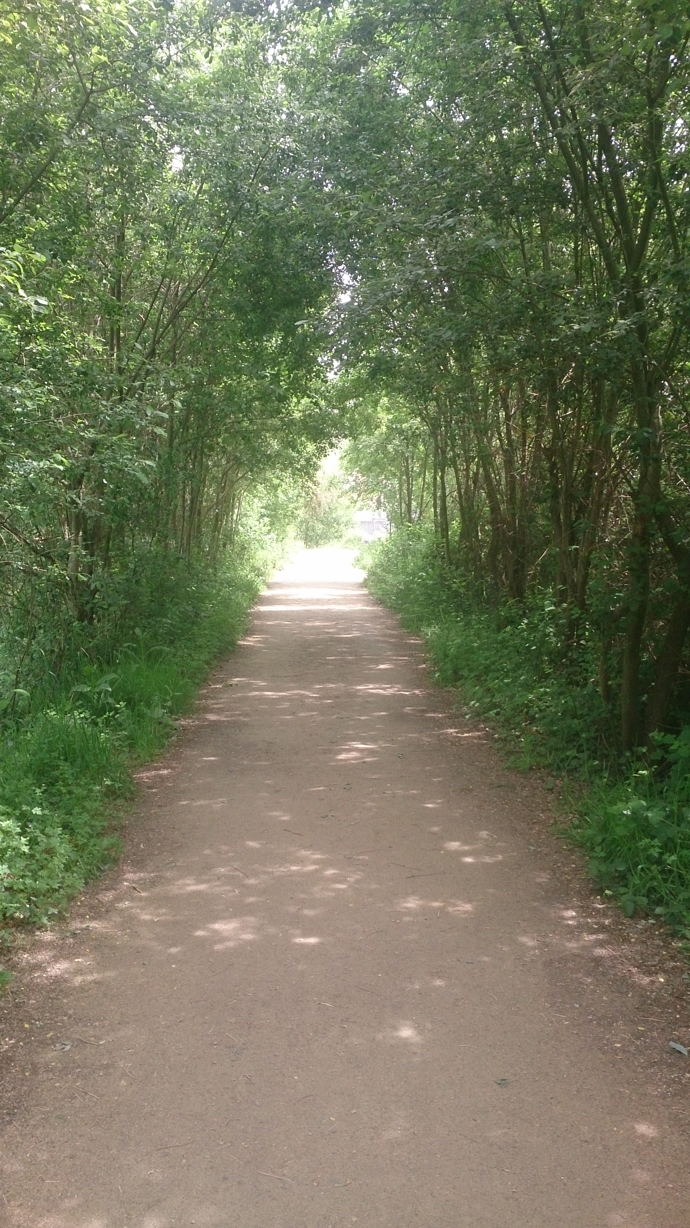 Foto tomada en Brañas de Sar en Santiago de Compostela